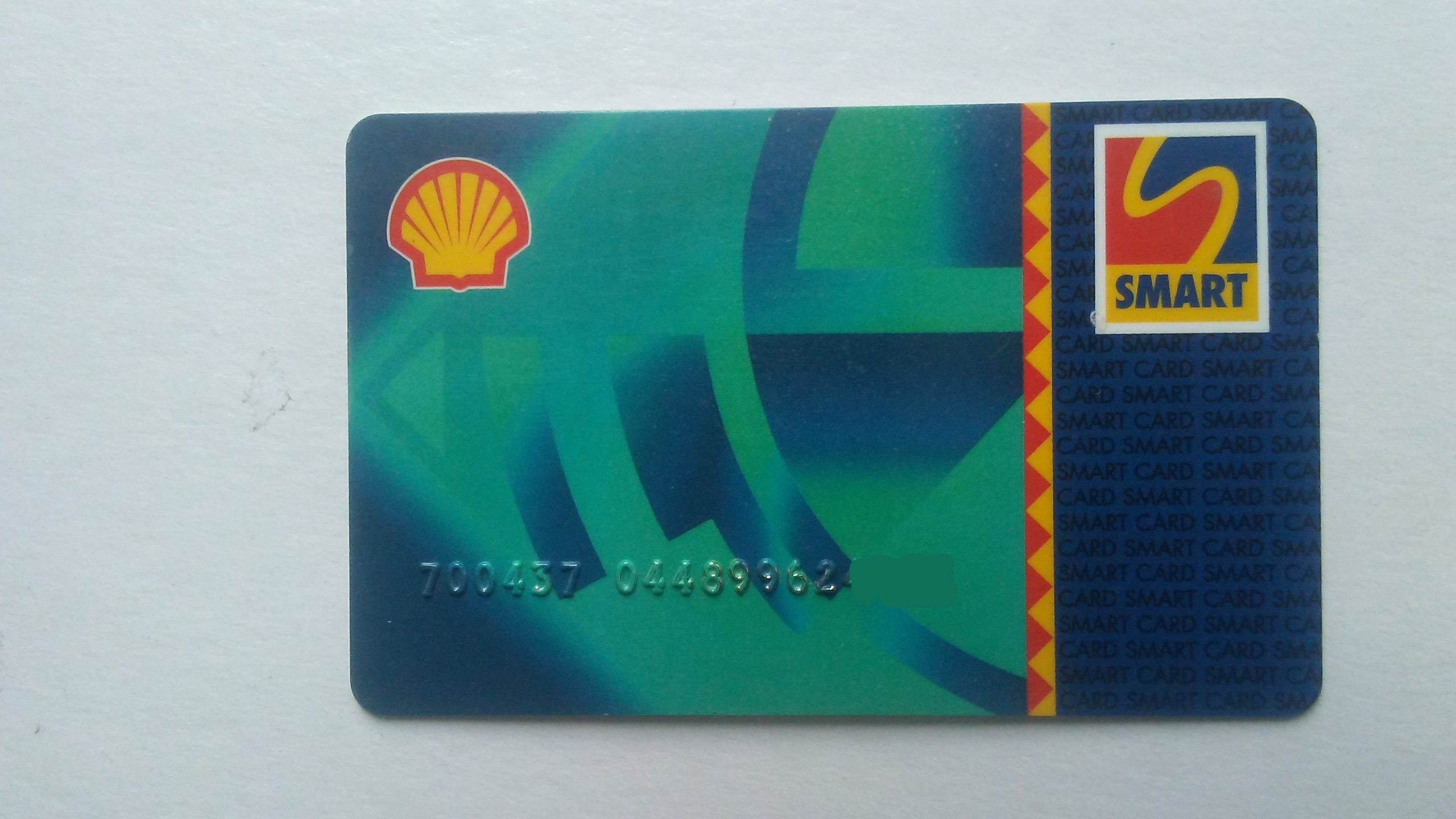 Karta programu lojalnościowego holendersko–brytyjskich stacji paliw Shell w Polsce